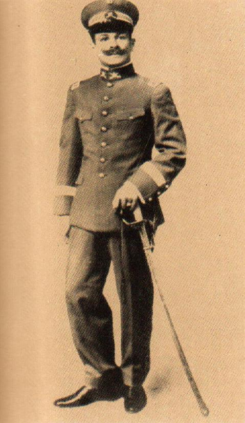 General Manuel Rábago